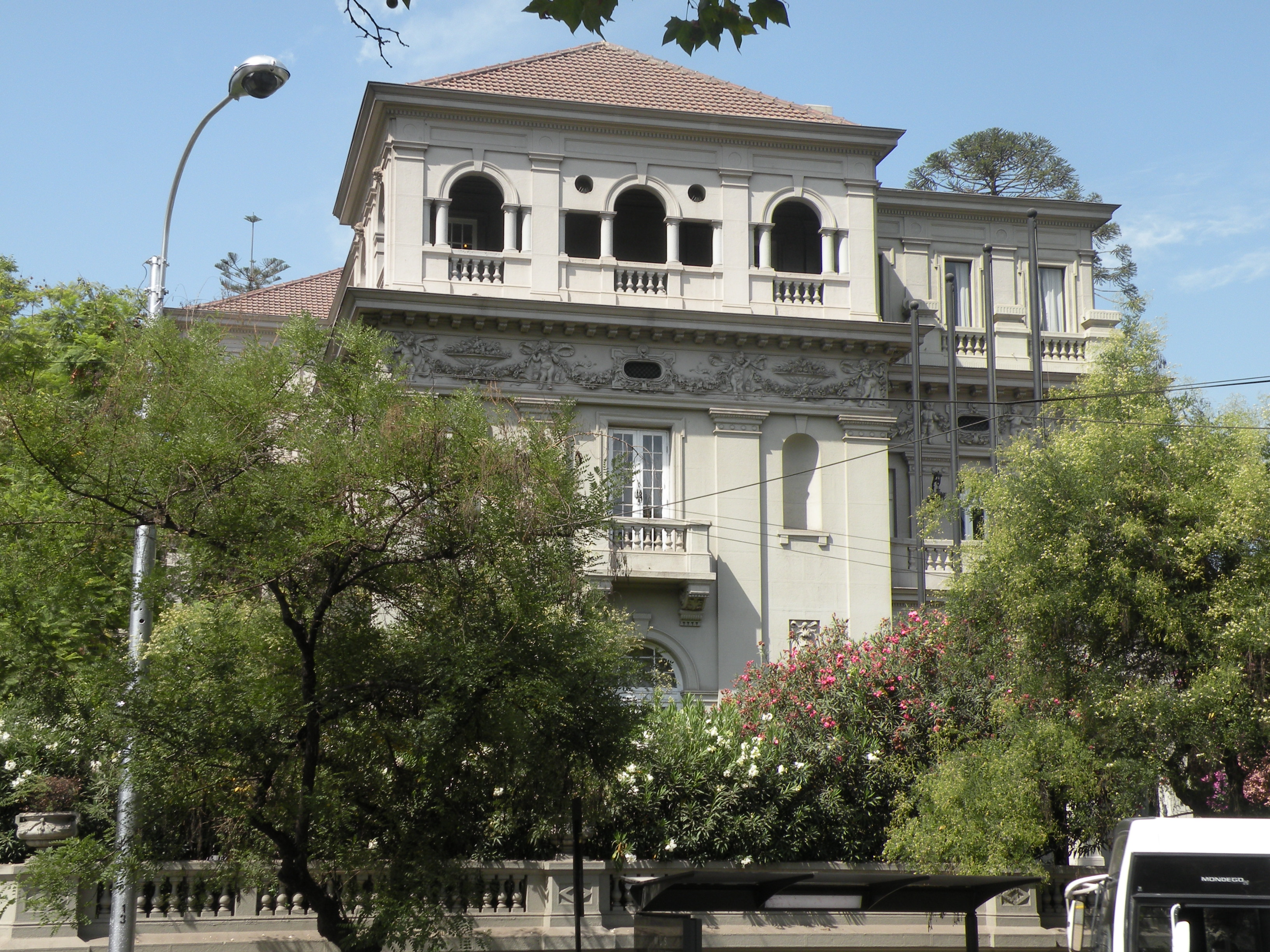 Palacio Bruna, actual sede de la Camara Nacional de Comercio y ex Consulado Estadounidense.